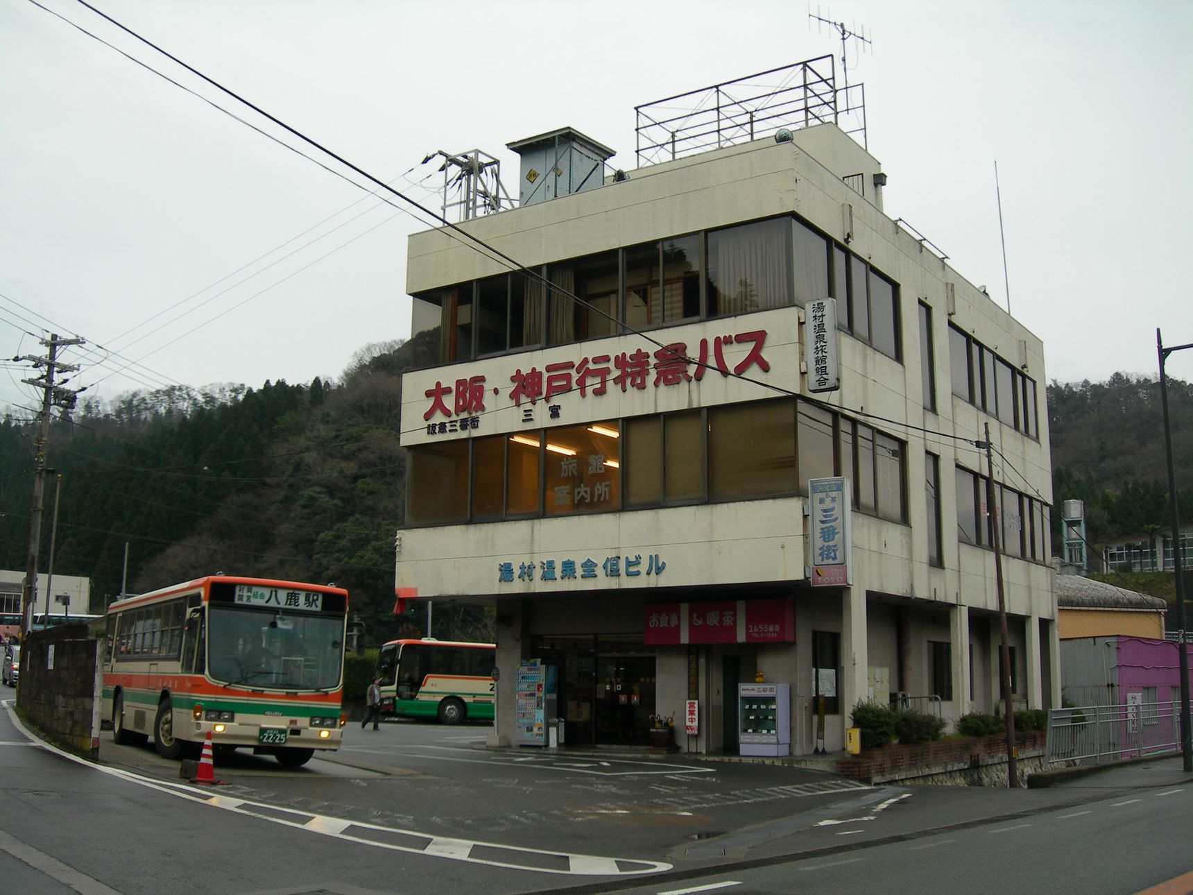 全但バス湯村温泉営業所